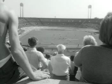 FC Amsterdam-PSV, augustus 1973.